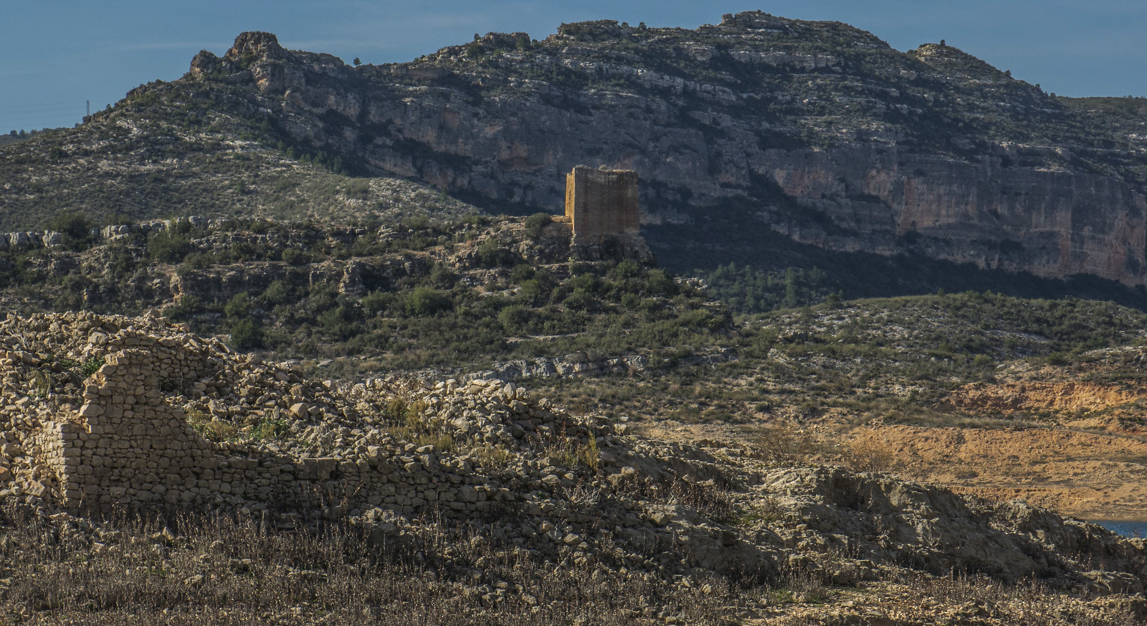 La Torre de vigilància de Tous és un bé d'interès cultural. Està situada al terme municipal de Tous, a la comarca de la Ribera Alta.